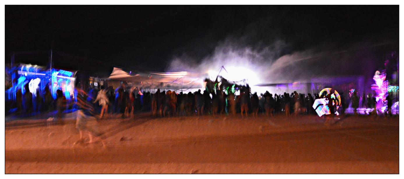 Free party in Italia.